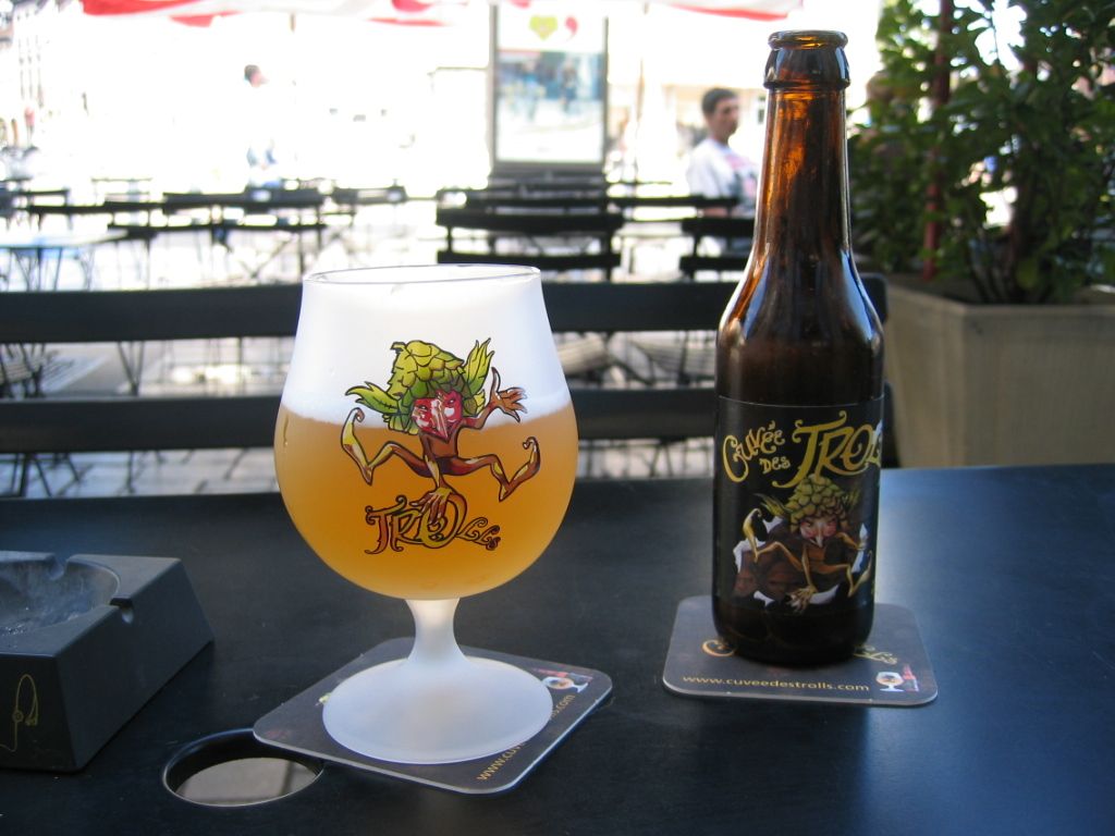 Biere Cuvée des Trolls